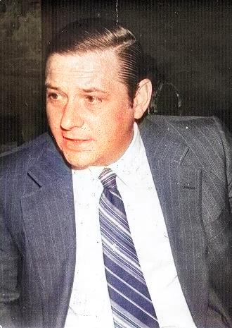 Gobernador de Jujuy